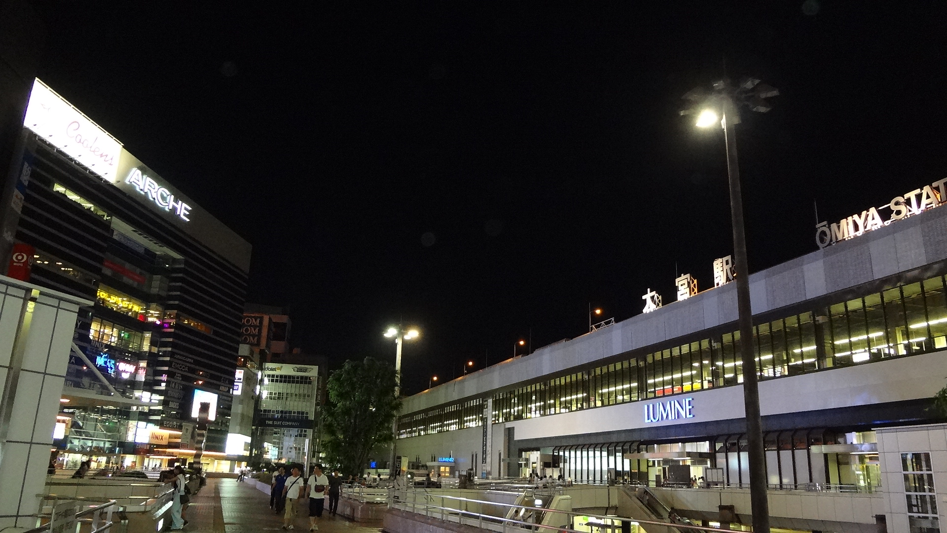 埼玉県さいたま市大宮区 JR大宮駅 西口 2014年8月2日撮影